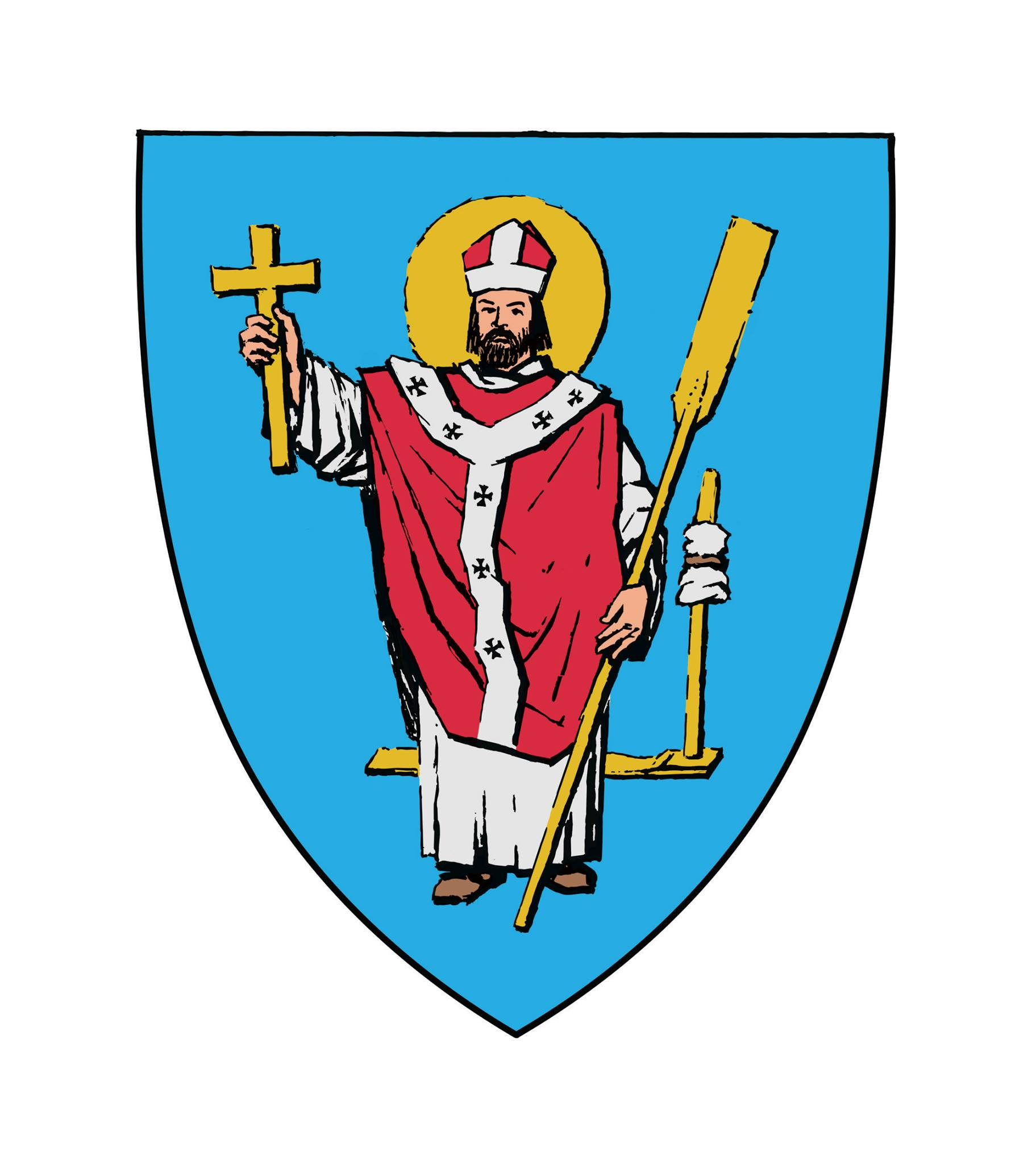 Herb Woli Raniżowskiej